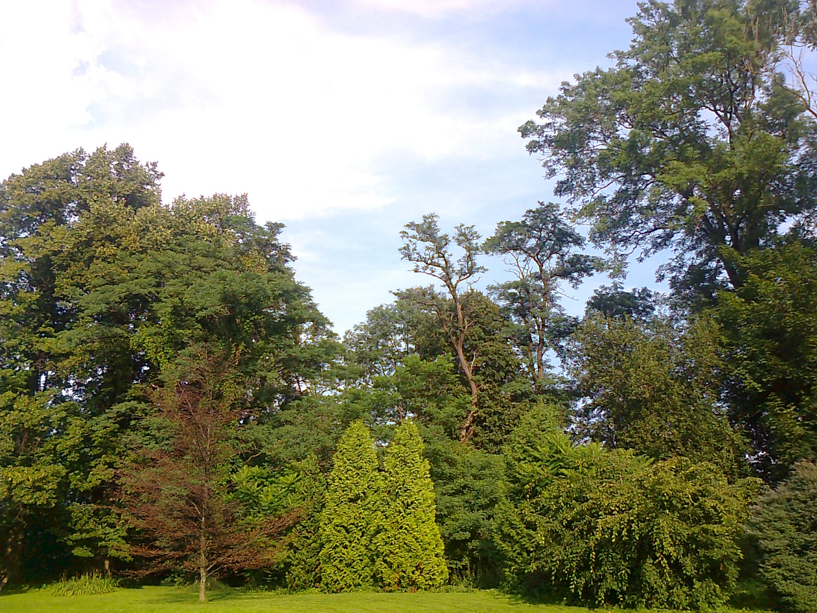 Wysoka - ogród w zespole dworskim, 1 poł. XVII, XX